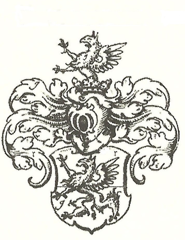 Wappen der Unzer, Siebmachers W.B. IX